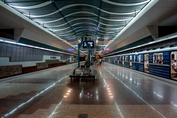 Метростанция Сердика